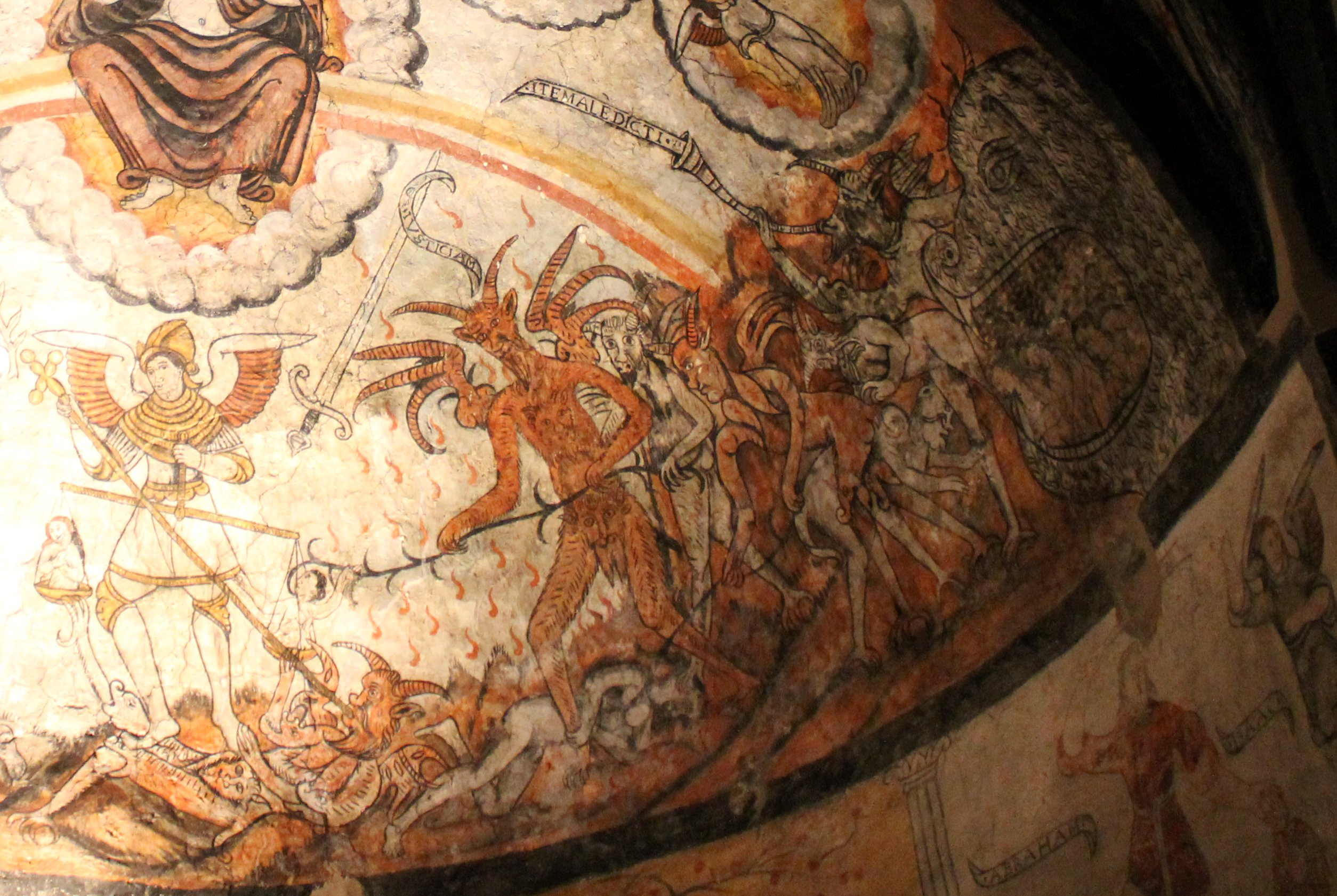 Aragonés: Imáchens de l'infierno en a ilesia de Sant Chuan d'o Toledo (A Fueva). Os diaples pintaus con rasgos d'animals, con caras representadas en diferents puestos d'o cuerpo, como lo peto u os chenitals. Lucifer con un fierro con ganchos se mira ta sacar as almas d'a balanza y conducir-las ta la boca d'o Leviatán. Un arcánchel luita contra un diaple mientres que s'aguanta la balanza en a que se basculan as almas, en mirando-se ta salvar-las ta Cielo.